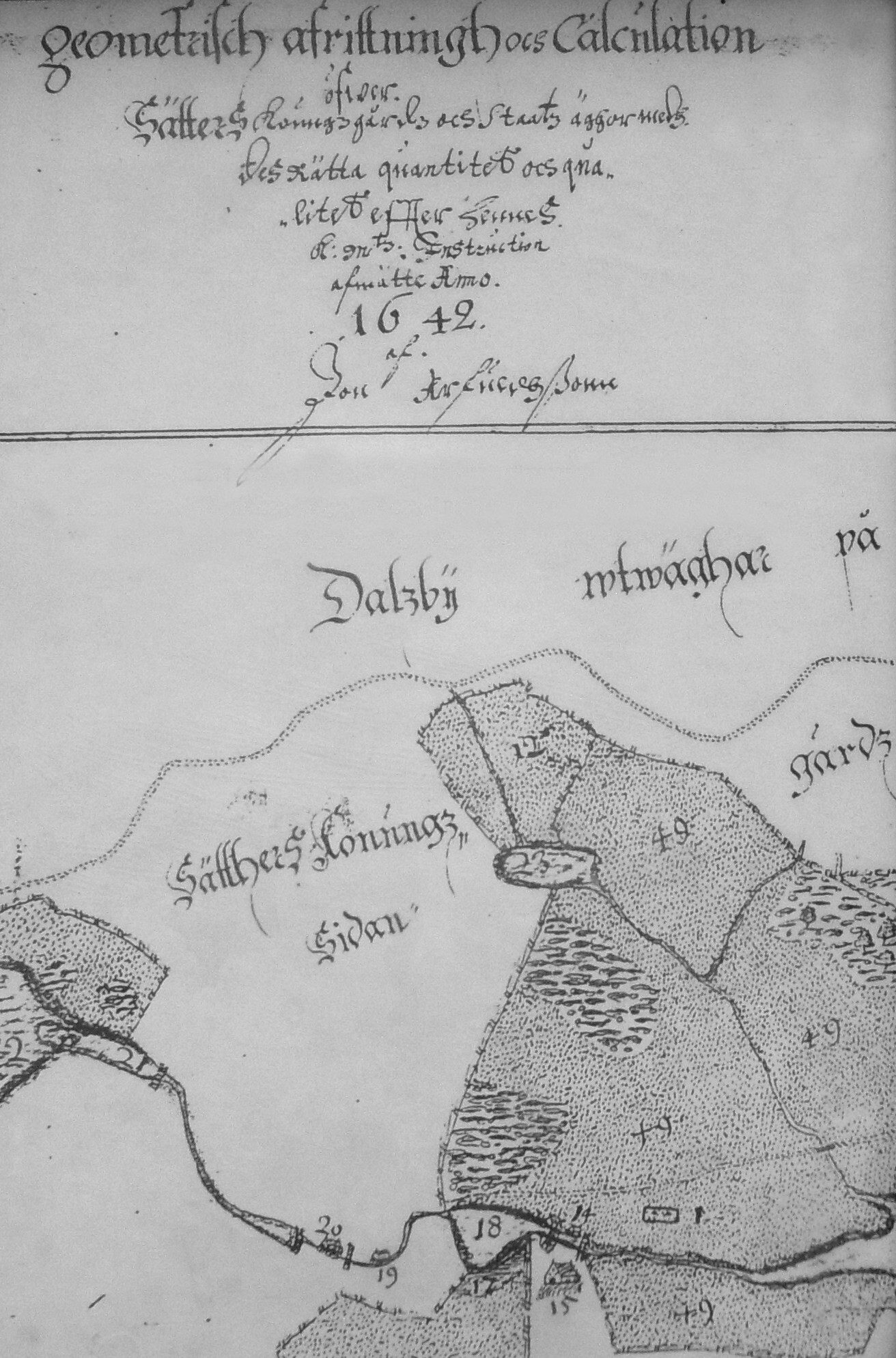 Karta över hyttområdet för Jönshyttan. Förklaringar: 14 Jönshytte hammare 15 Bosta för Lorness Rennverksmästare 18 Jönshytte hålldamm 19 Lodstöparbo kvarn 20 Ödeshammare 21 Hålldamm vid Rishyttesjön 23 Simonshyttesjö